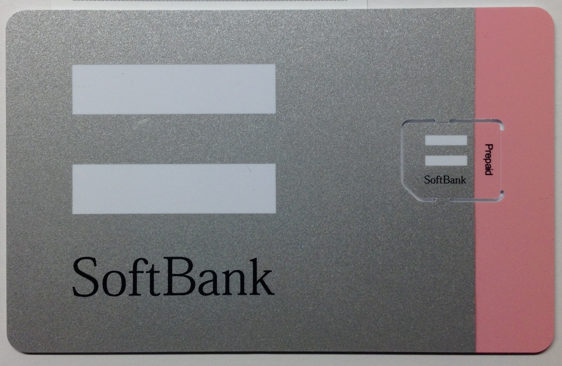 ソフトバンクモバイルのプリペイドスマートフォン「プリスマ」用Micro 3G USIMカード